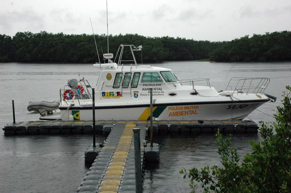 Embarcação utilizada pelo Batalhão de Polícia Ambiental no patrulhamento da costa paranaense.